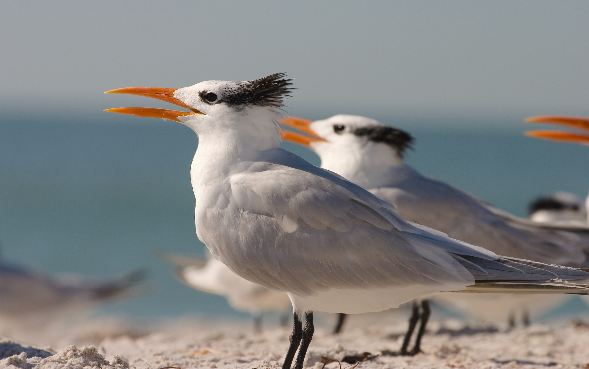 Royal Tern